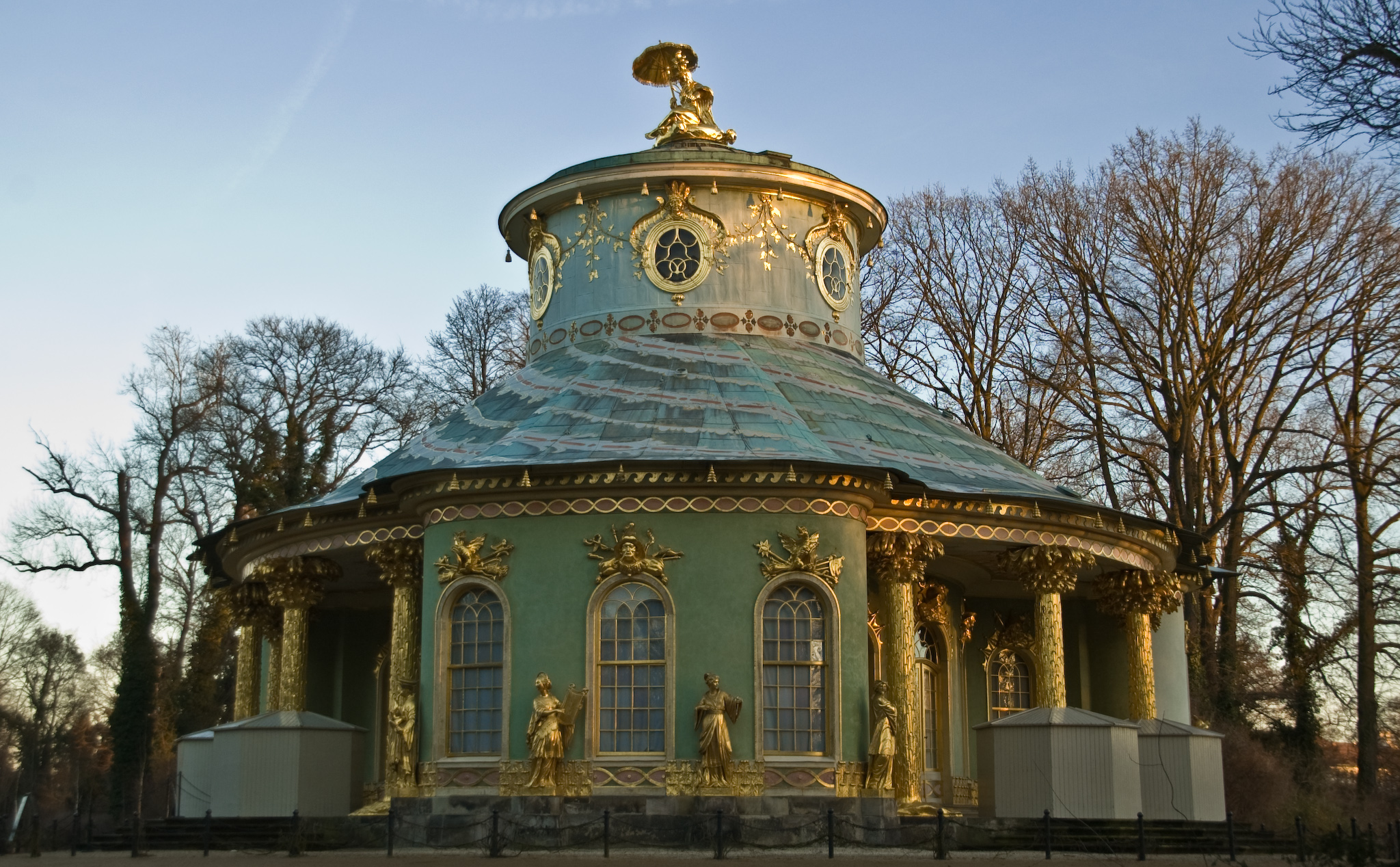 Chinesisches Haus im Park Sanssouci/Chinese House in Sanssouci Park